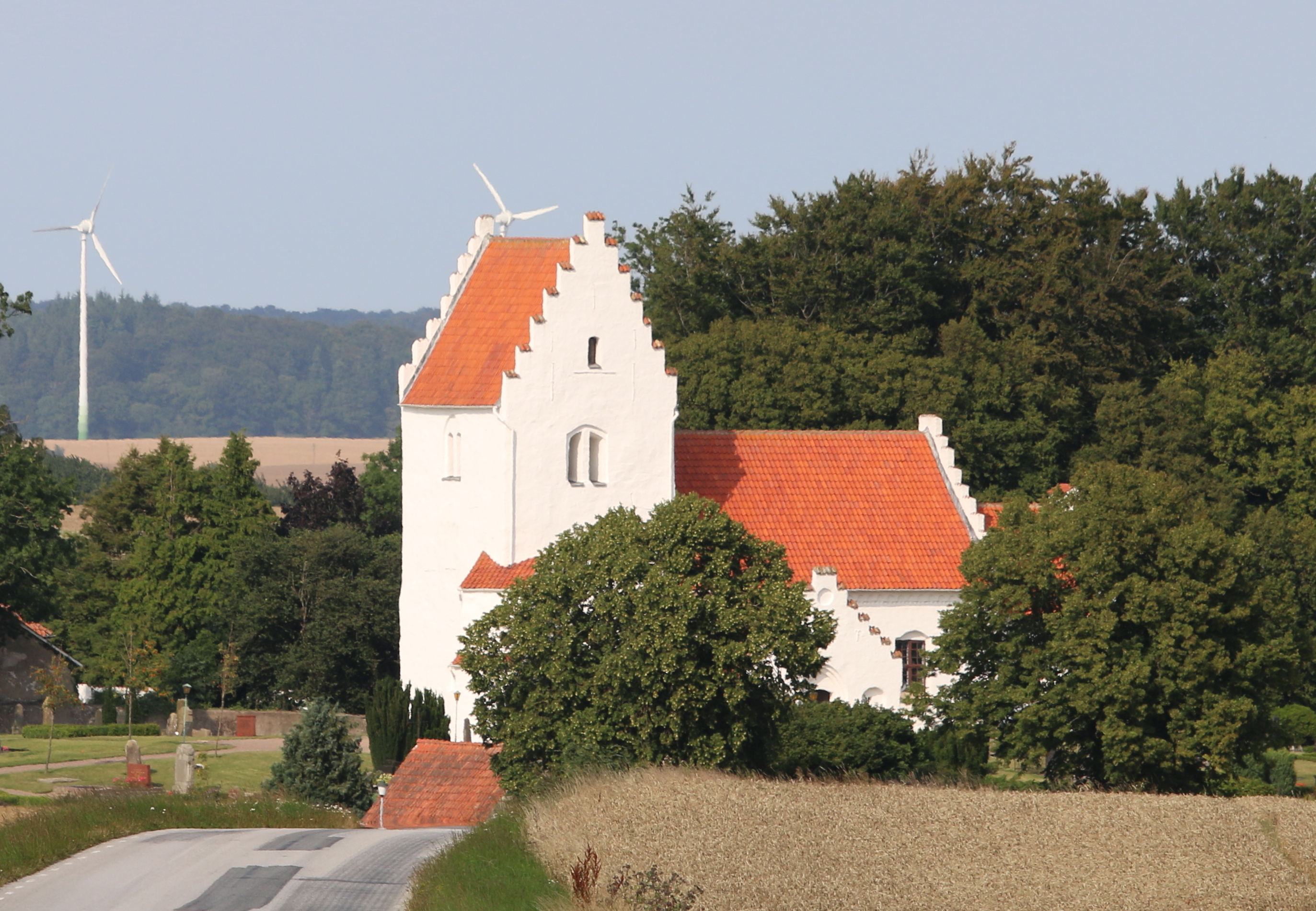 Örsjö kyrka augusti 2015